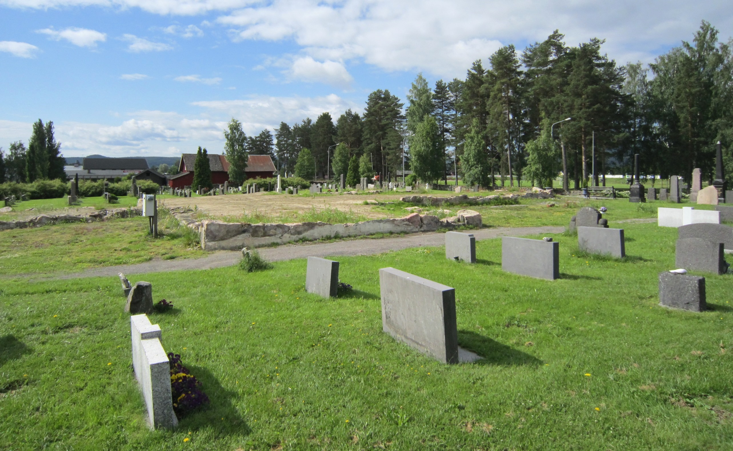 Branntomten etter Våler kirke i 2011